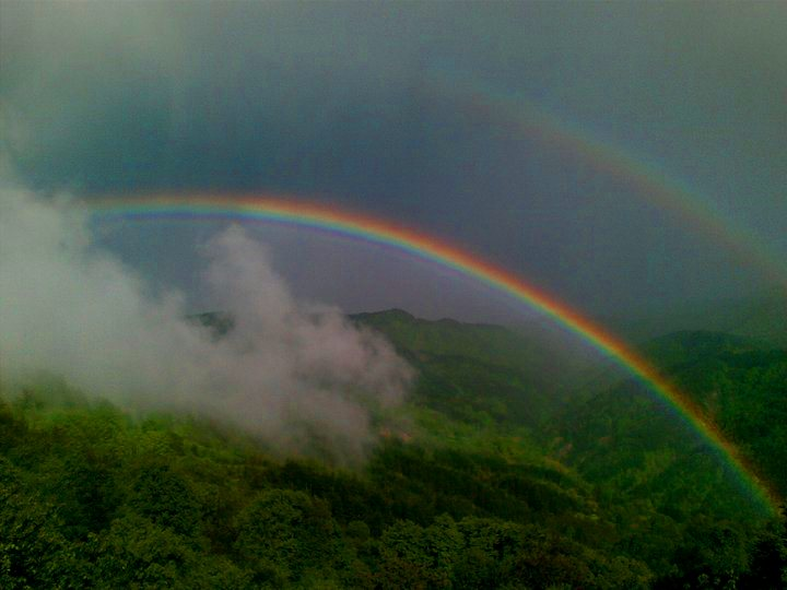 Дъга над Гърнати